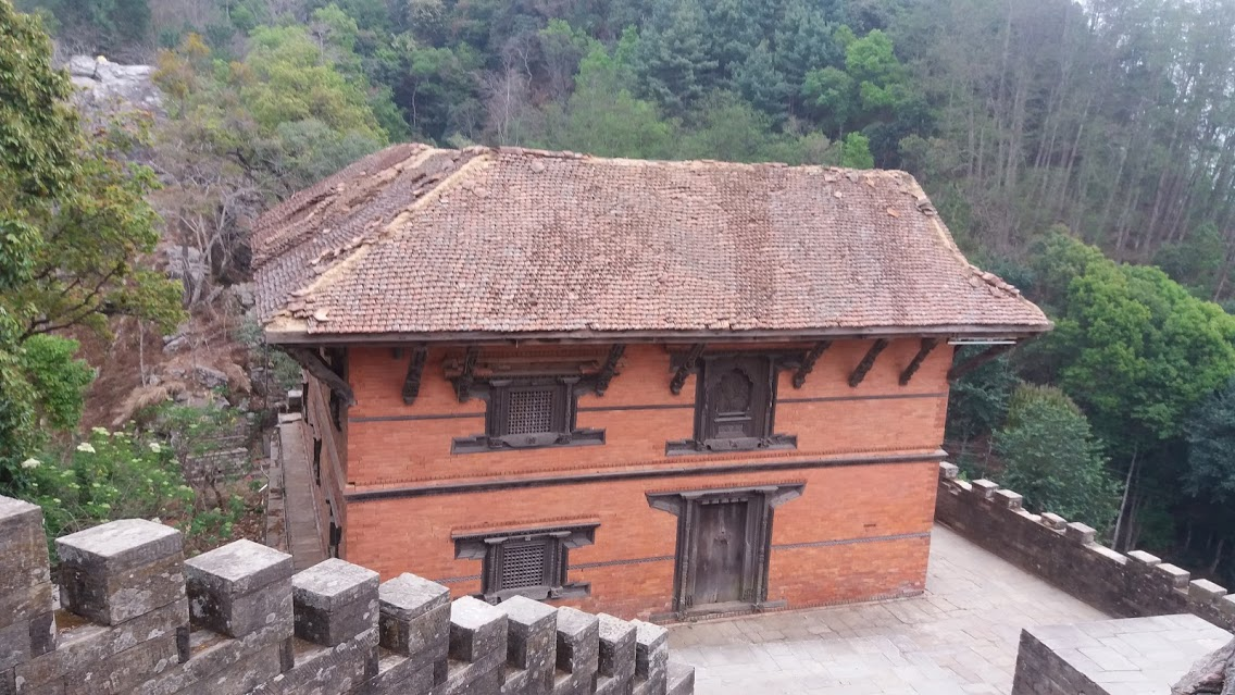 नेपाली: गोरखा दरवार